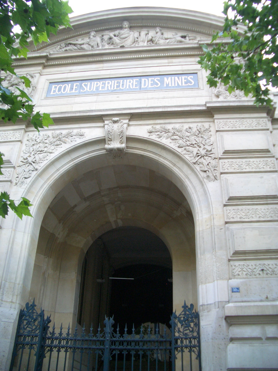 "Front gate of Ecole des Mines"